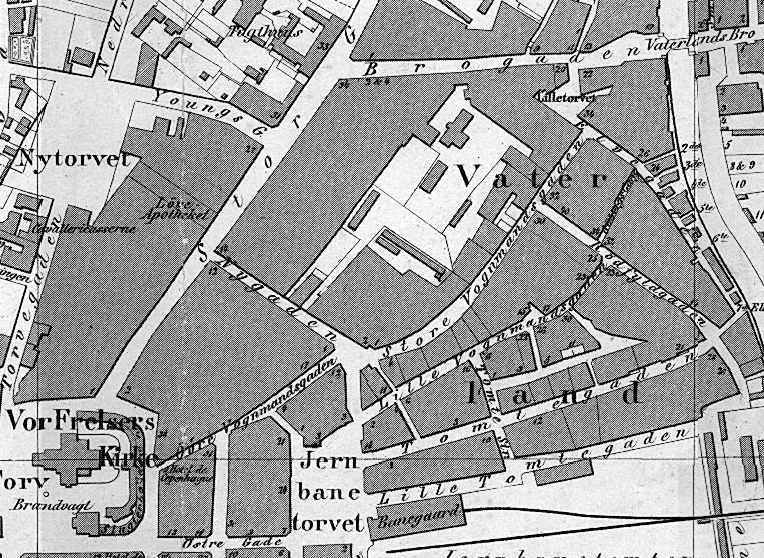 Kart over Vaterland, Kristiania, 1861.